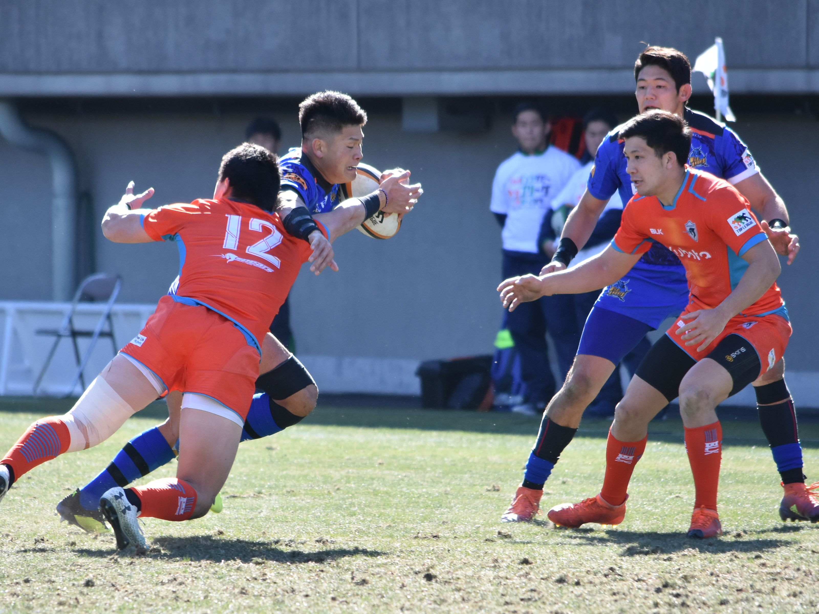 笹倉 康誉。秩父宮ラグビー場にて。 Nikon D3400